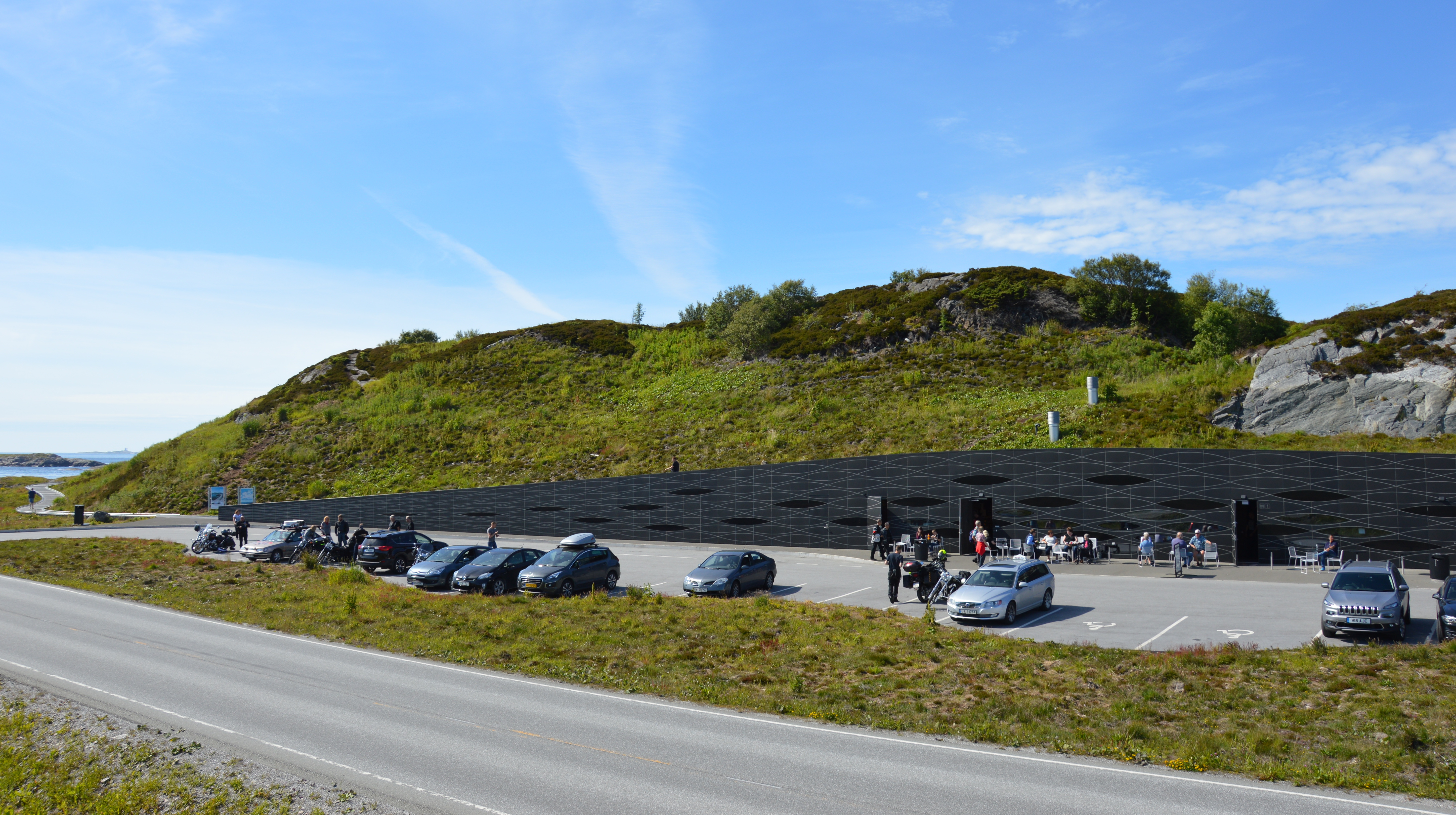 Lyngholmen